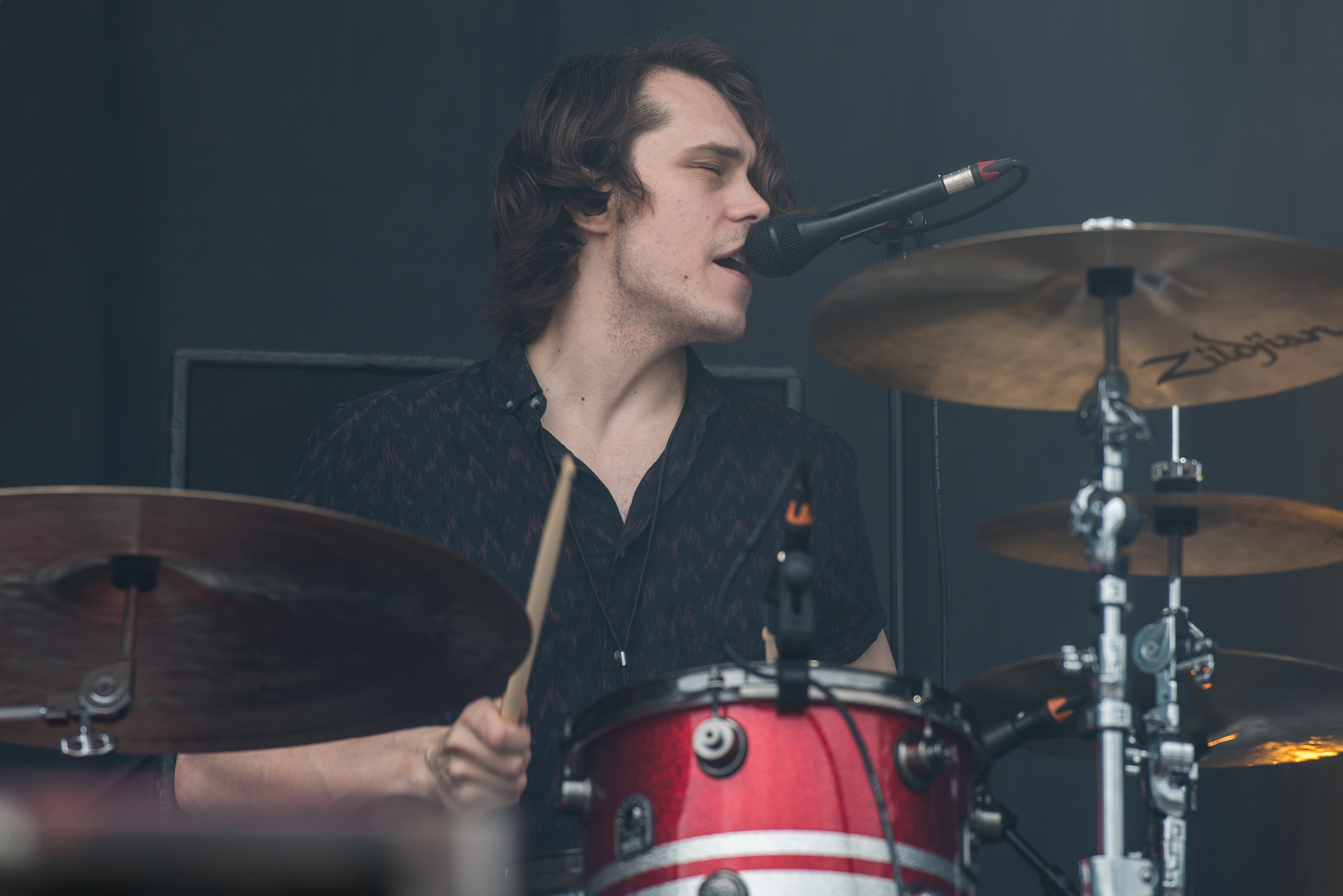 ARGO-Konzerte,Beck's Park Stage,Don Broco,Konzert,Livekonzert,Livemusik,Matt Donnelly,Musik,RiP,Rock im Park 2017